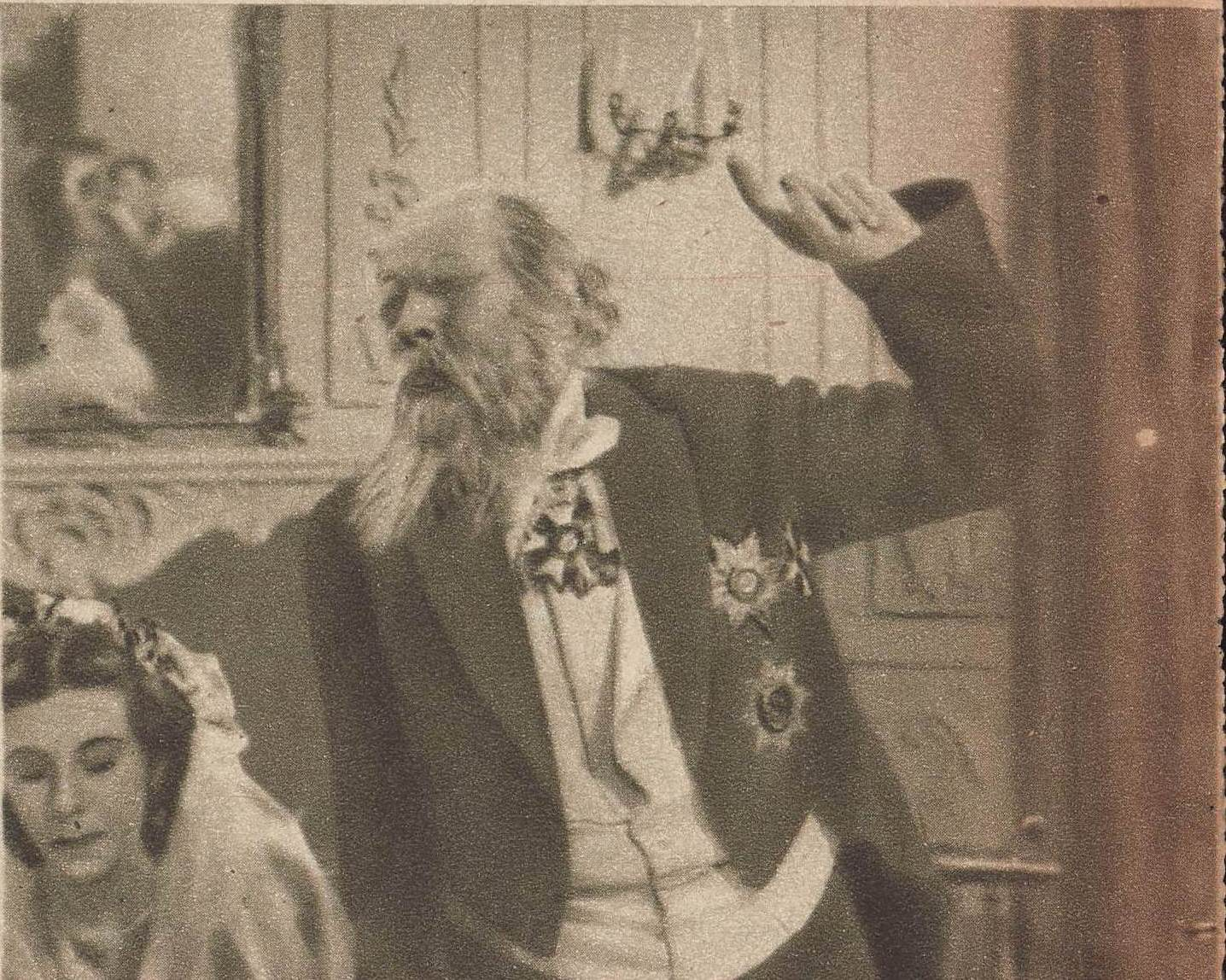 Ludwik Solski w sztuce "U mety" Karola Huberta Rostworowskiego, z filmu Geniusz sceny